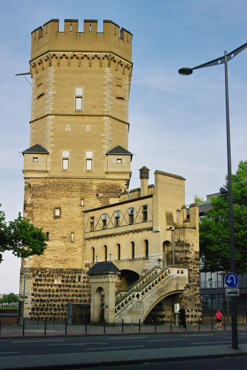 Bayenturm Köln